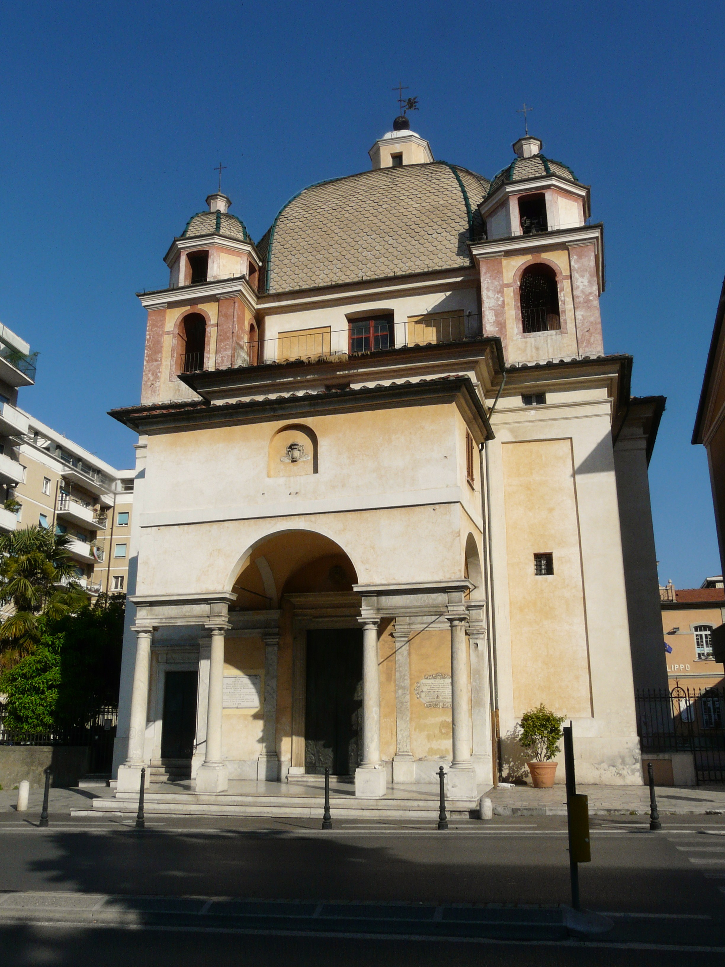 Chiesa della Misericordia, Massa, Toscana, Italia